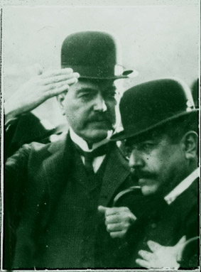 Hipólito Yrigoyen en compañía del Vicegobernador de Santa Fe Ricardo Caballero